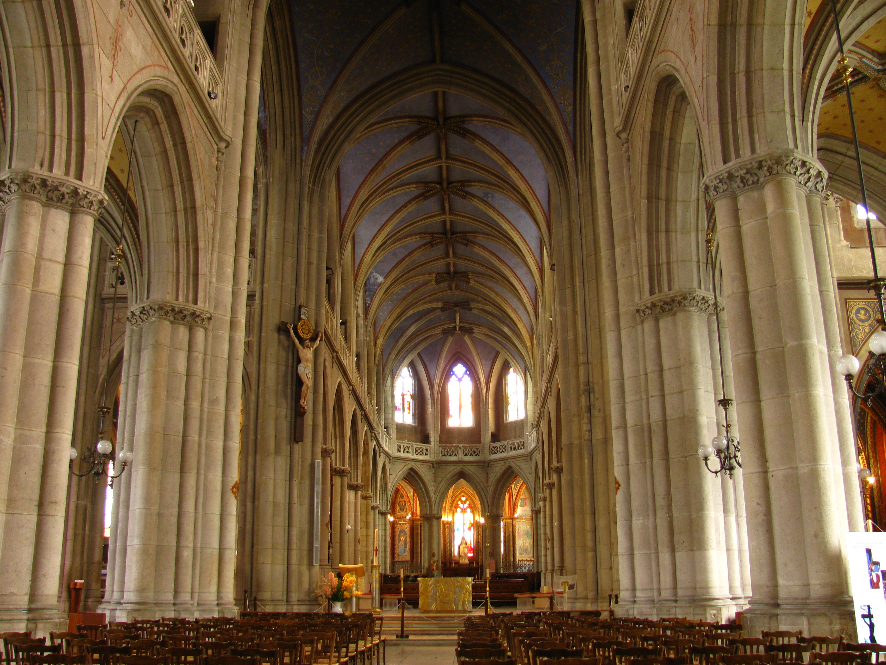 Cathédrale de Belley, intérieur